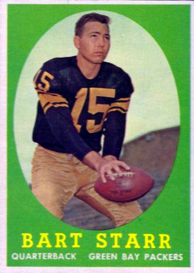 1958 Topps #66: Bart Starr